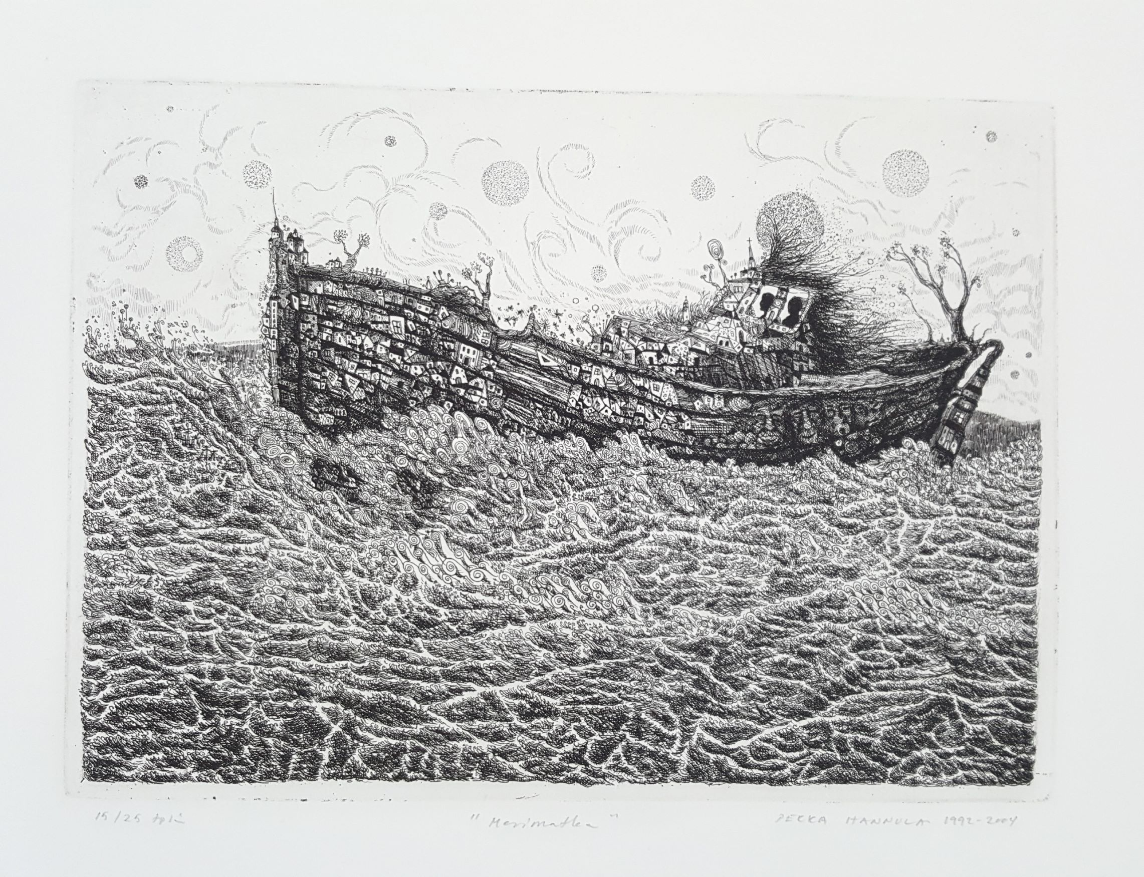 Pekka Hannula, Merimatka, etsaus 1992-2004